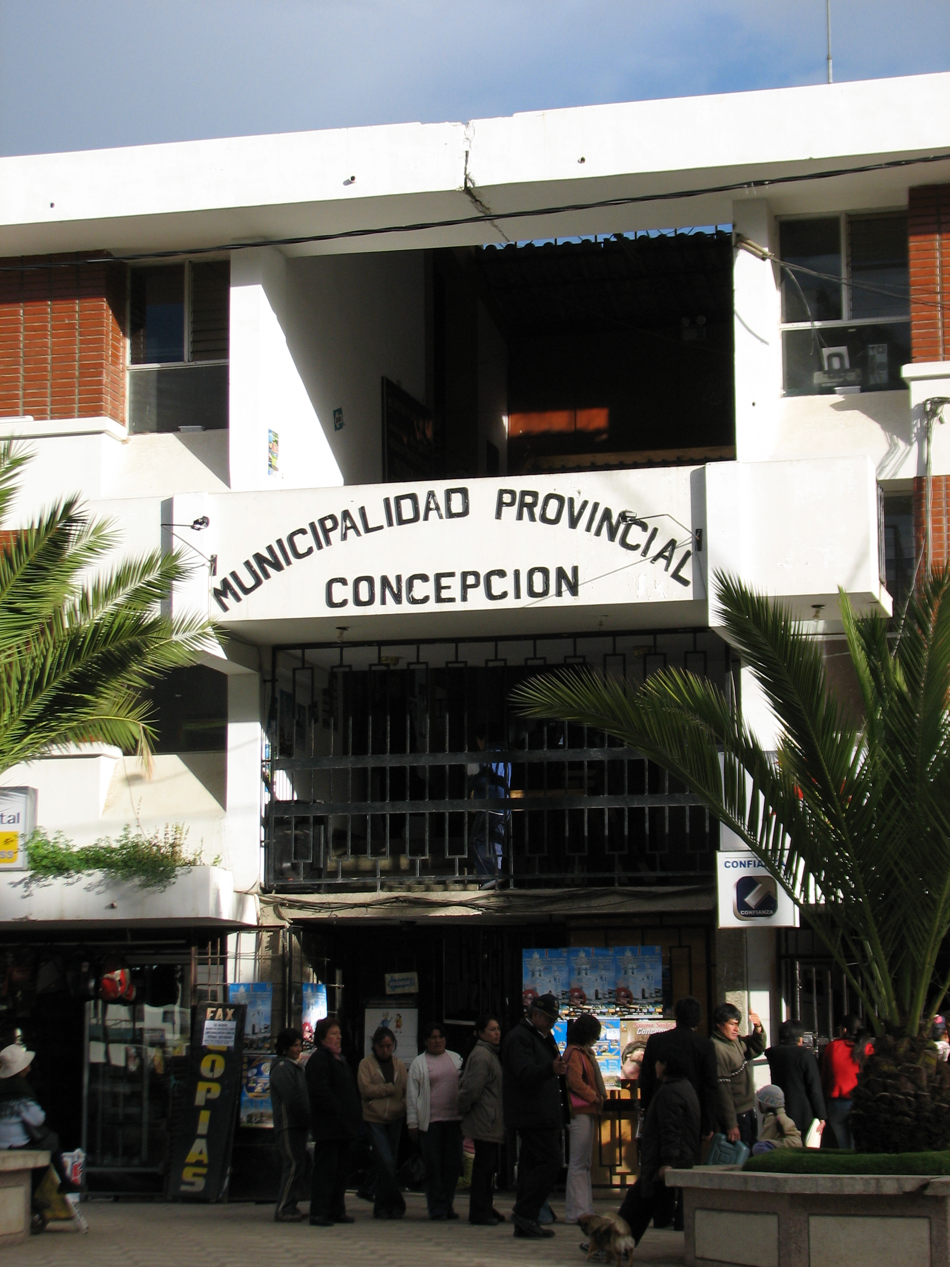 Municipalidad, Concepción/Concepción/Junín, Peru.jpg